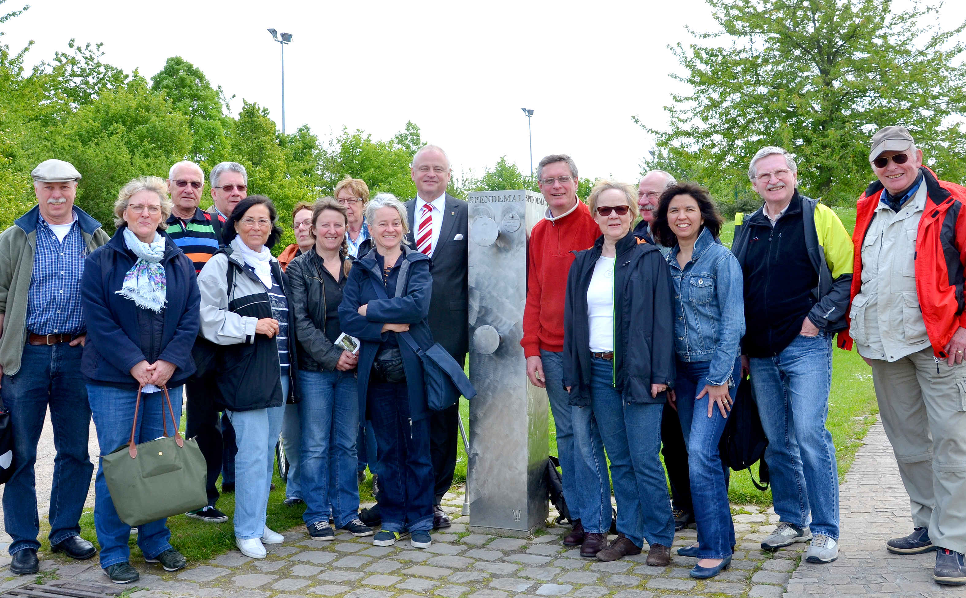 Teilnehmer der vom Freundeskreis Hannover im Mai 2014 organisierten Fahrradtour vom Maschsee bis zum Park der Sinne in Laatzen, hier als Gruppenbild mit Bürgermeister Thomas Prinz an der mit dem Hörsinn erlebbaren Skulptur „Spendemal“ ...